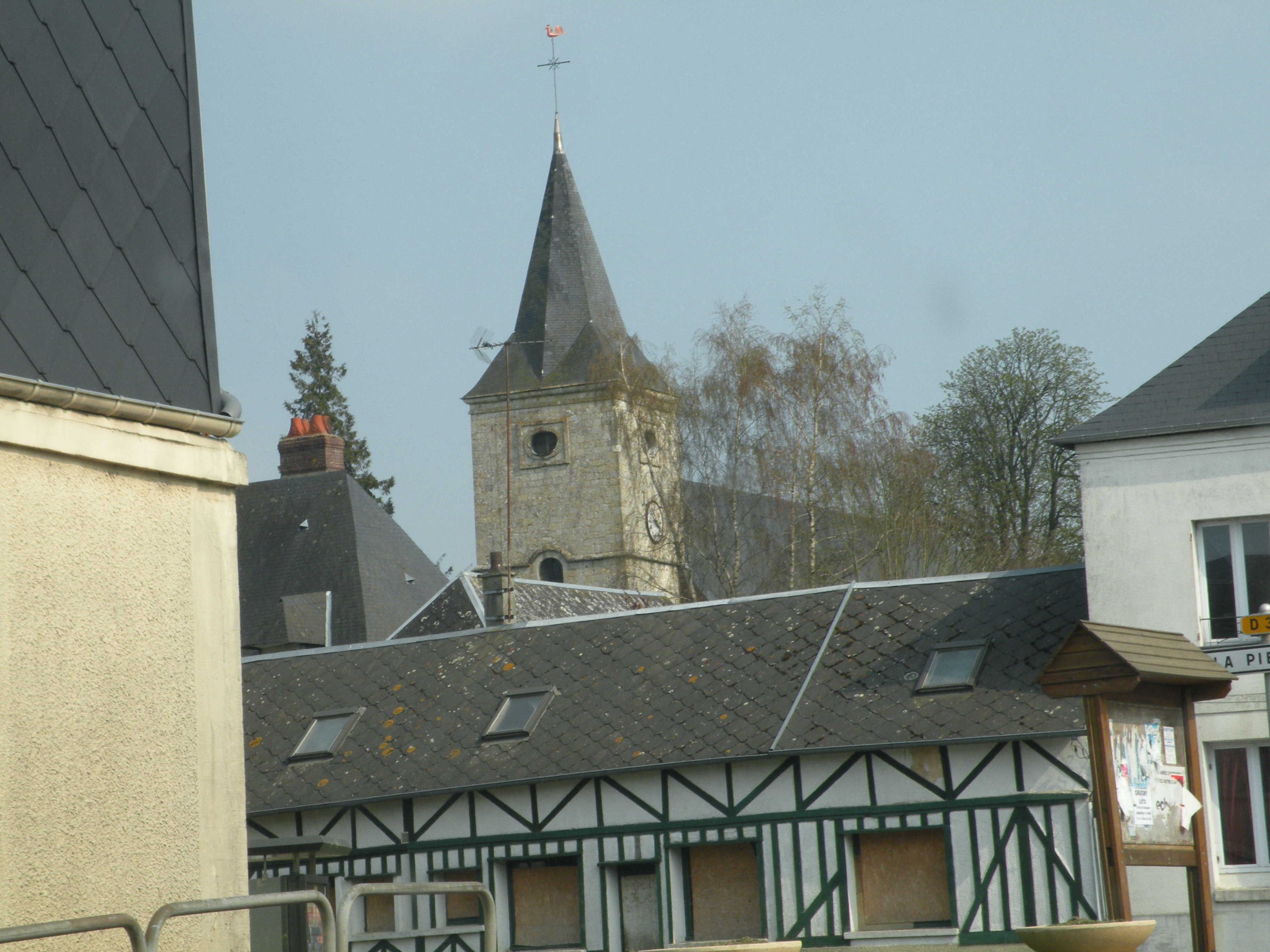 Église de Saint-Victor-l'Abbaye.